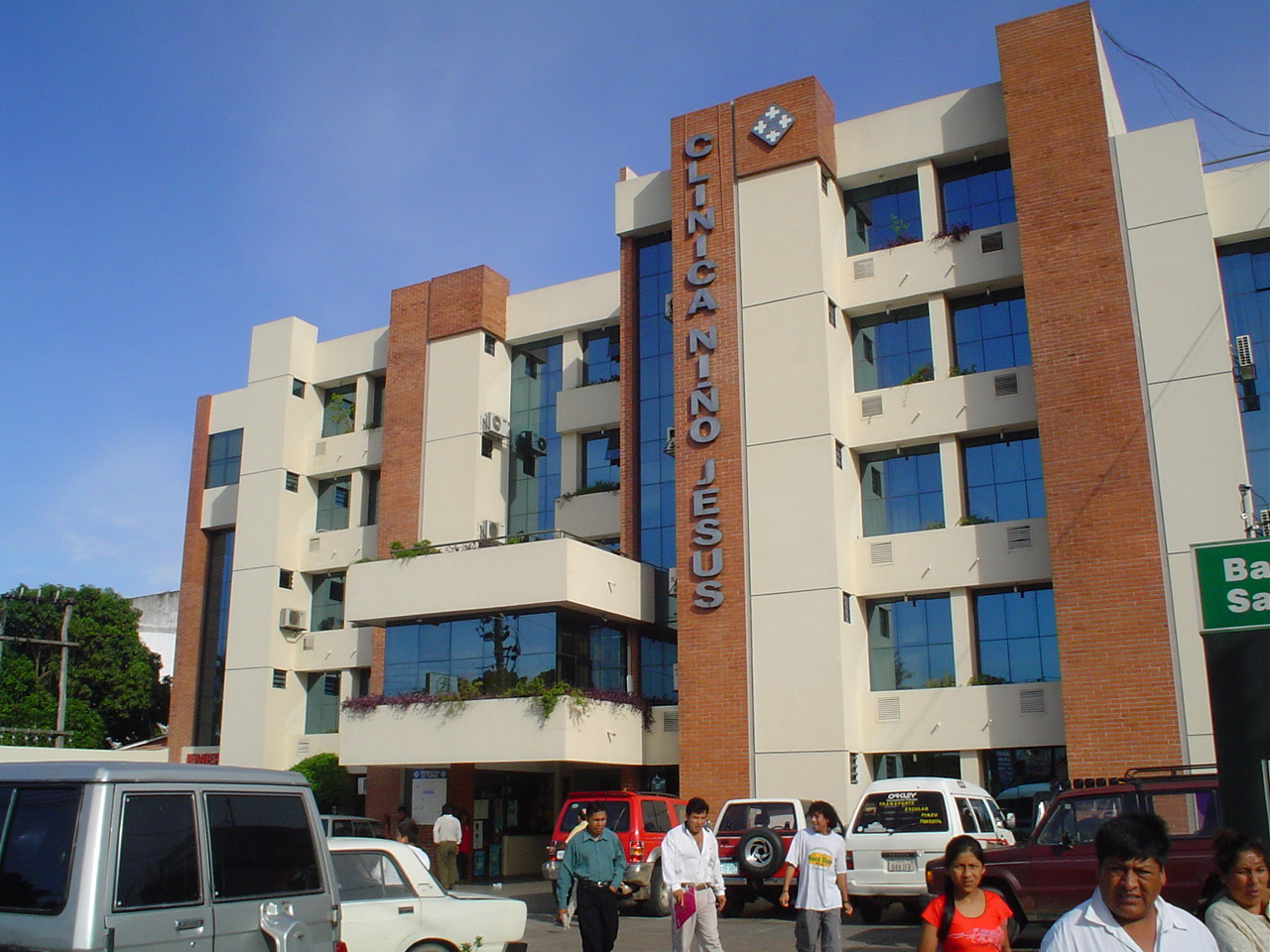 Clinica Niño Jesus